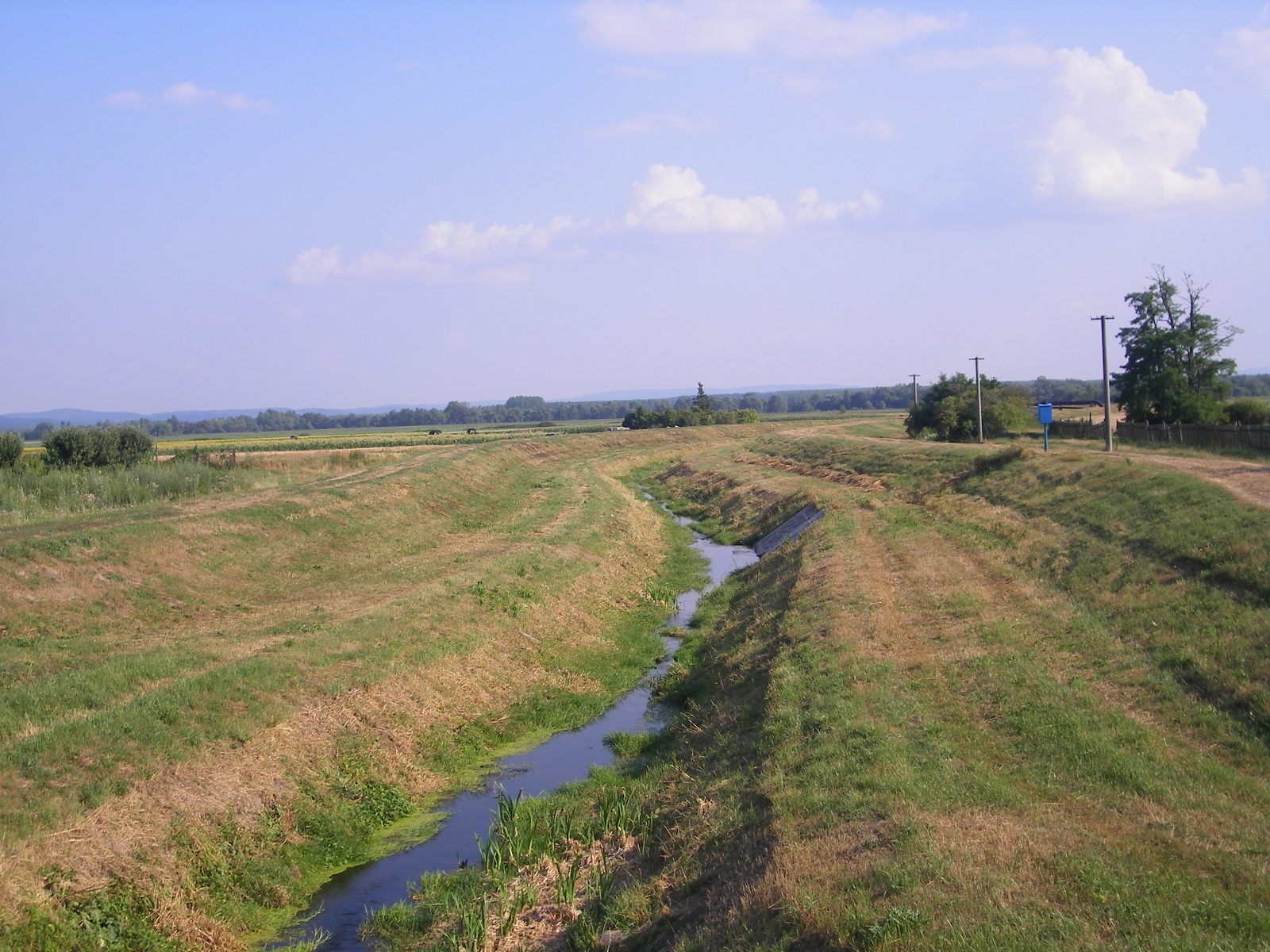 Ipolykeszi - Nagy-patak